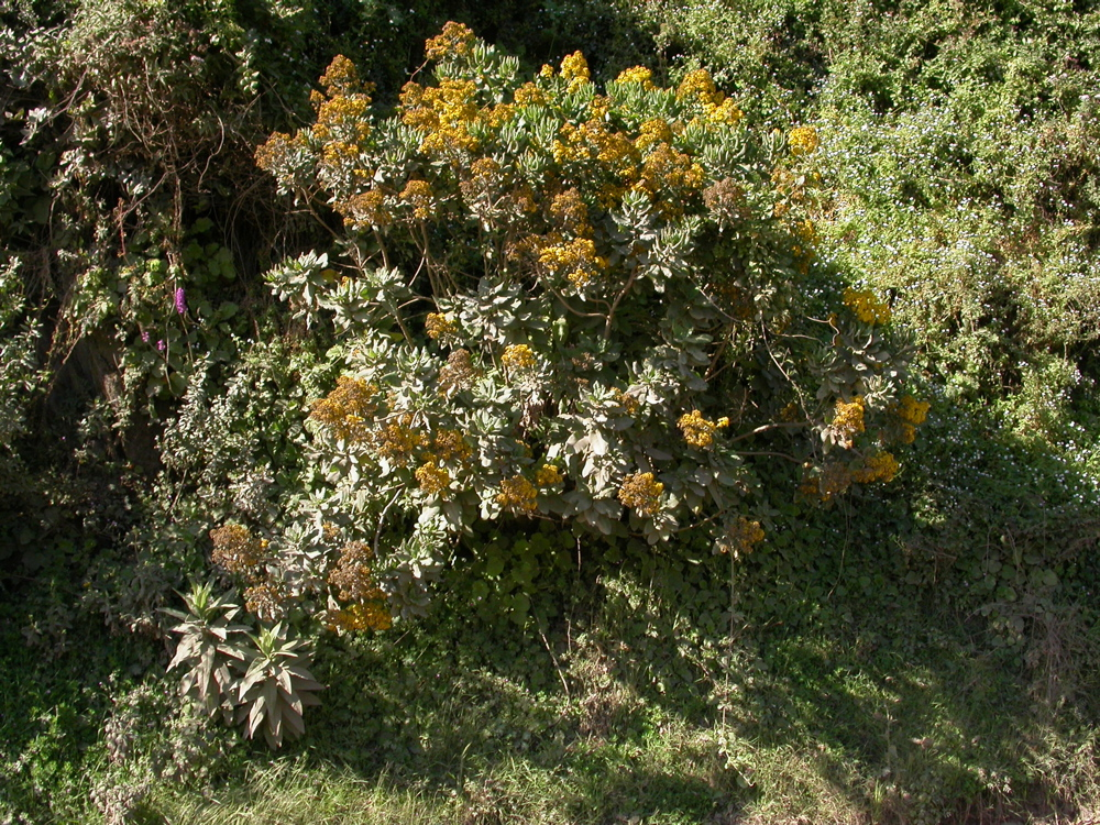 Acrisione denticulata